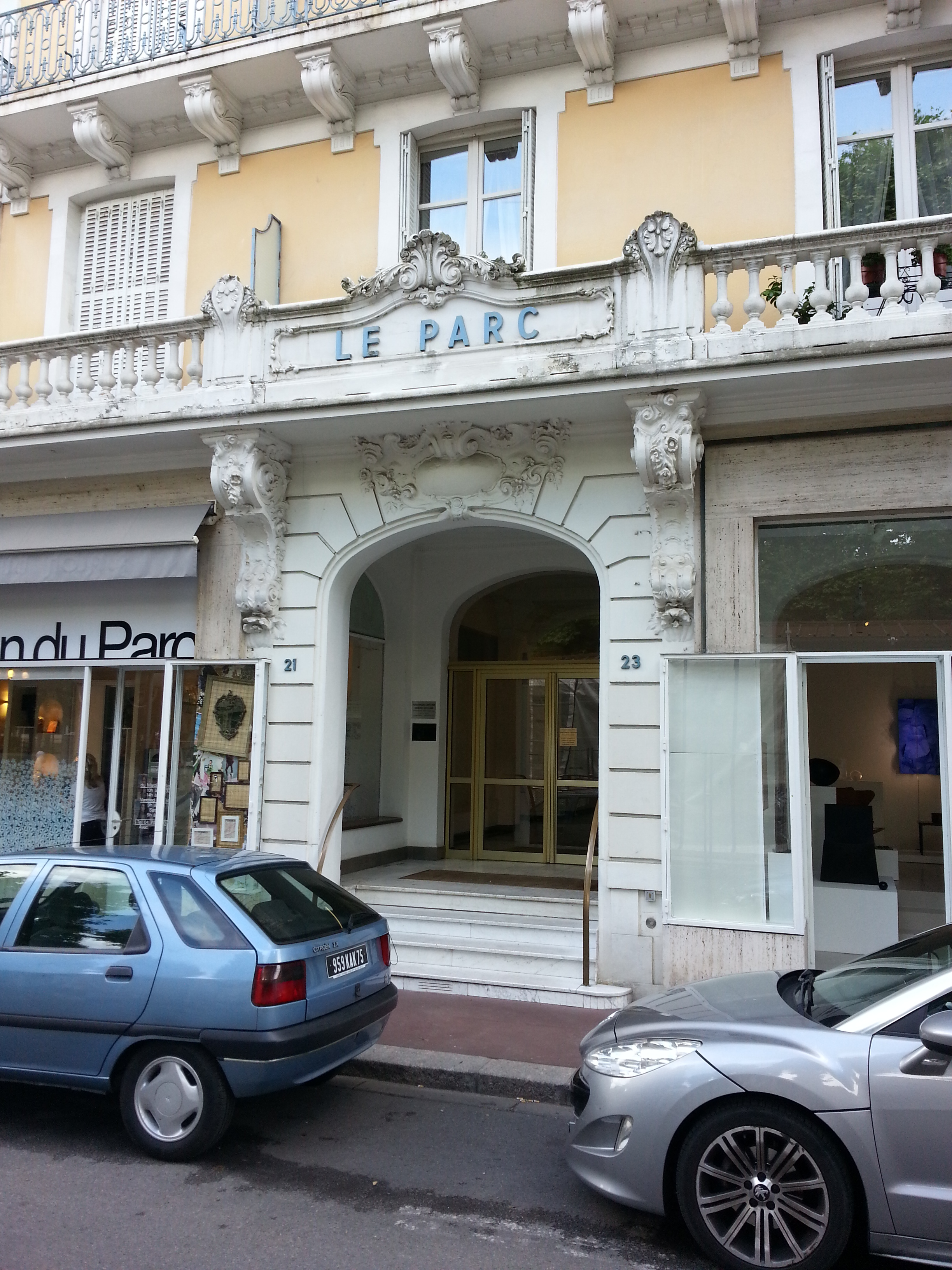 Entrée de l'ancien hôtel du Parc à Vichy, aujourd'hui une résidence privée.